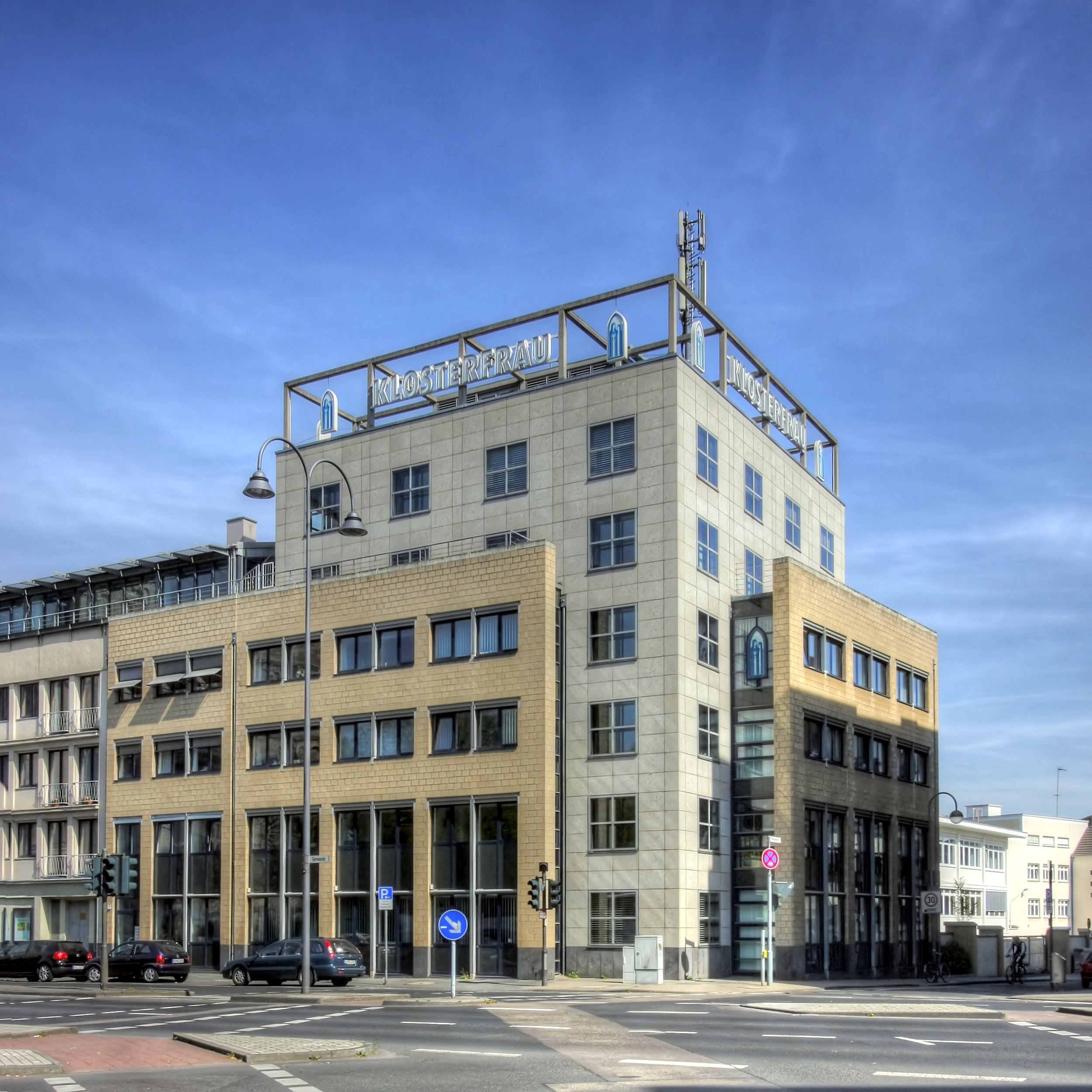 Klosterfrau Healthcare Group - Zentrale Köln. Ecke Gereonstraße/Klingelpütz